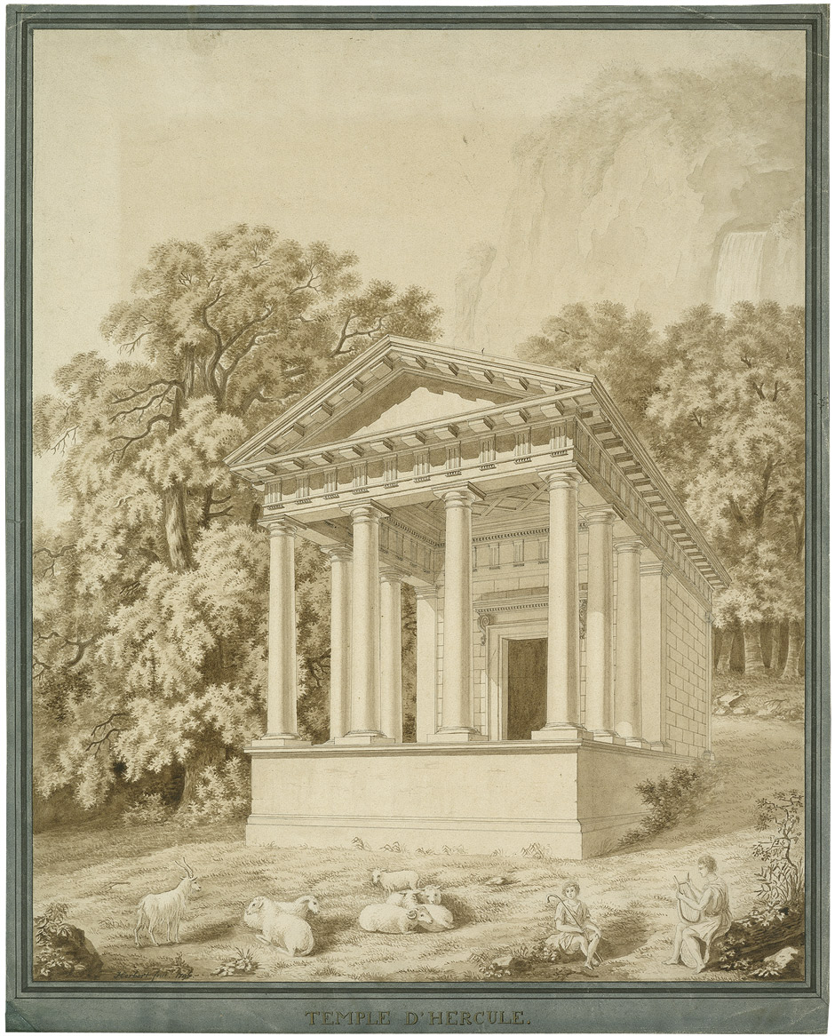 „Herbert“: Rekonstruktion des Herkulestempels in Cori. Feder in Grau, Pinsel in Braun, braun laviert. 48,4 x 38,7 cm. Unten links signiert und datiert "Herbert fecit. 1796".